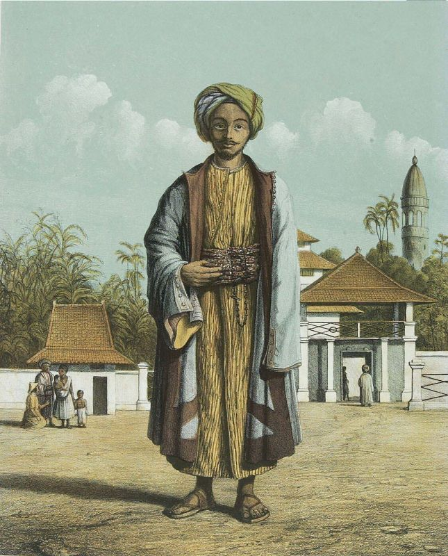 Litho. Litho naar een oorspronkelijke tekening van A. van Pers. Serie van losse gelithografeerde platen.. Een islamitische pelgrim die naar Mekka is geweest